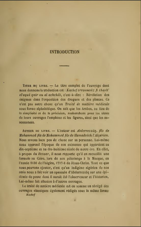 الصفحة الاولى من كتاب كشف الرموز لمؤلفه عبد الرزاق بن حمدوش الجزايري ترجمة فرنسية